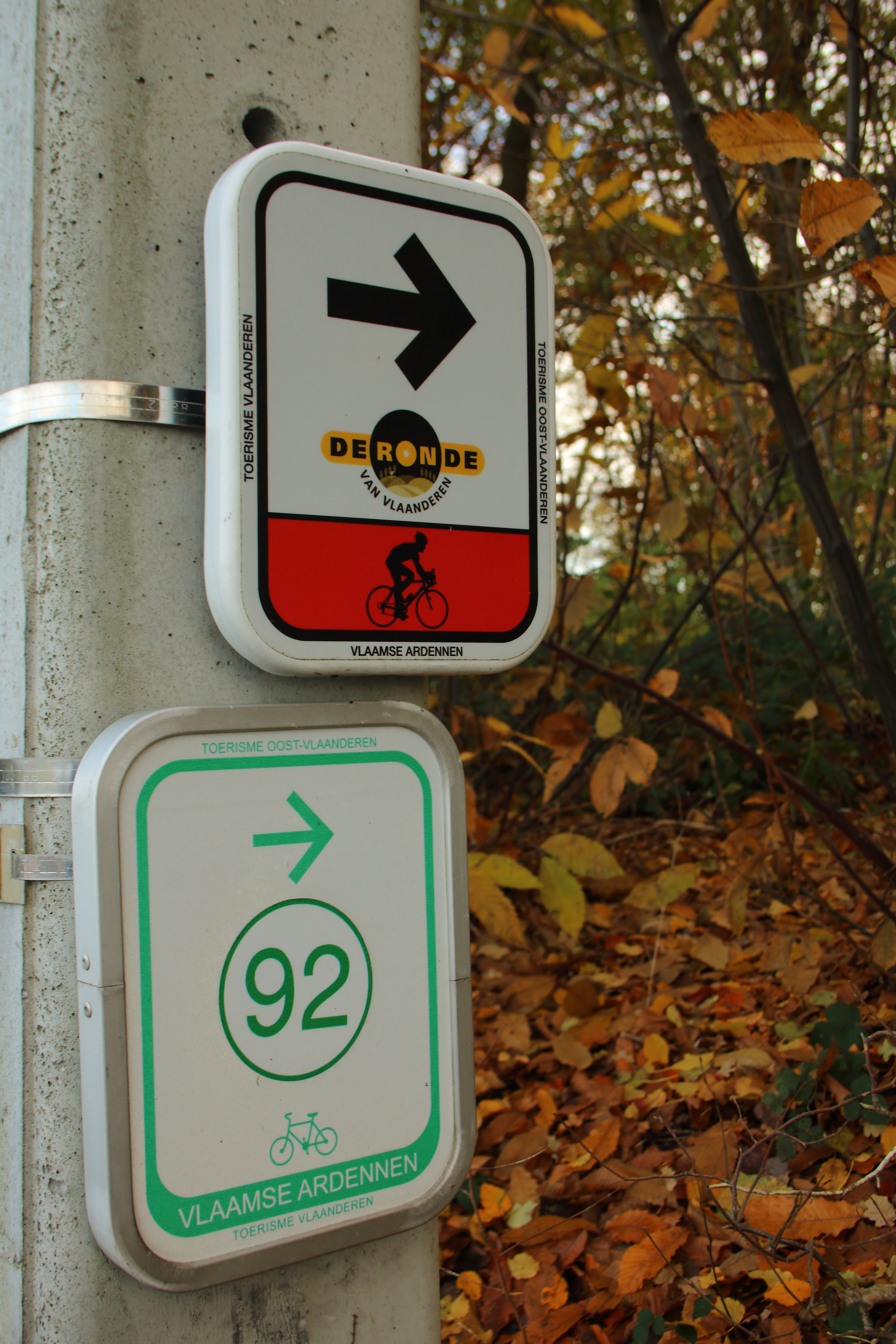 Vossenholstraat, Sint-Maria-Oudenhove, Zottegem, Vlaanderen, België